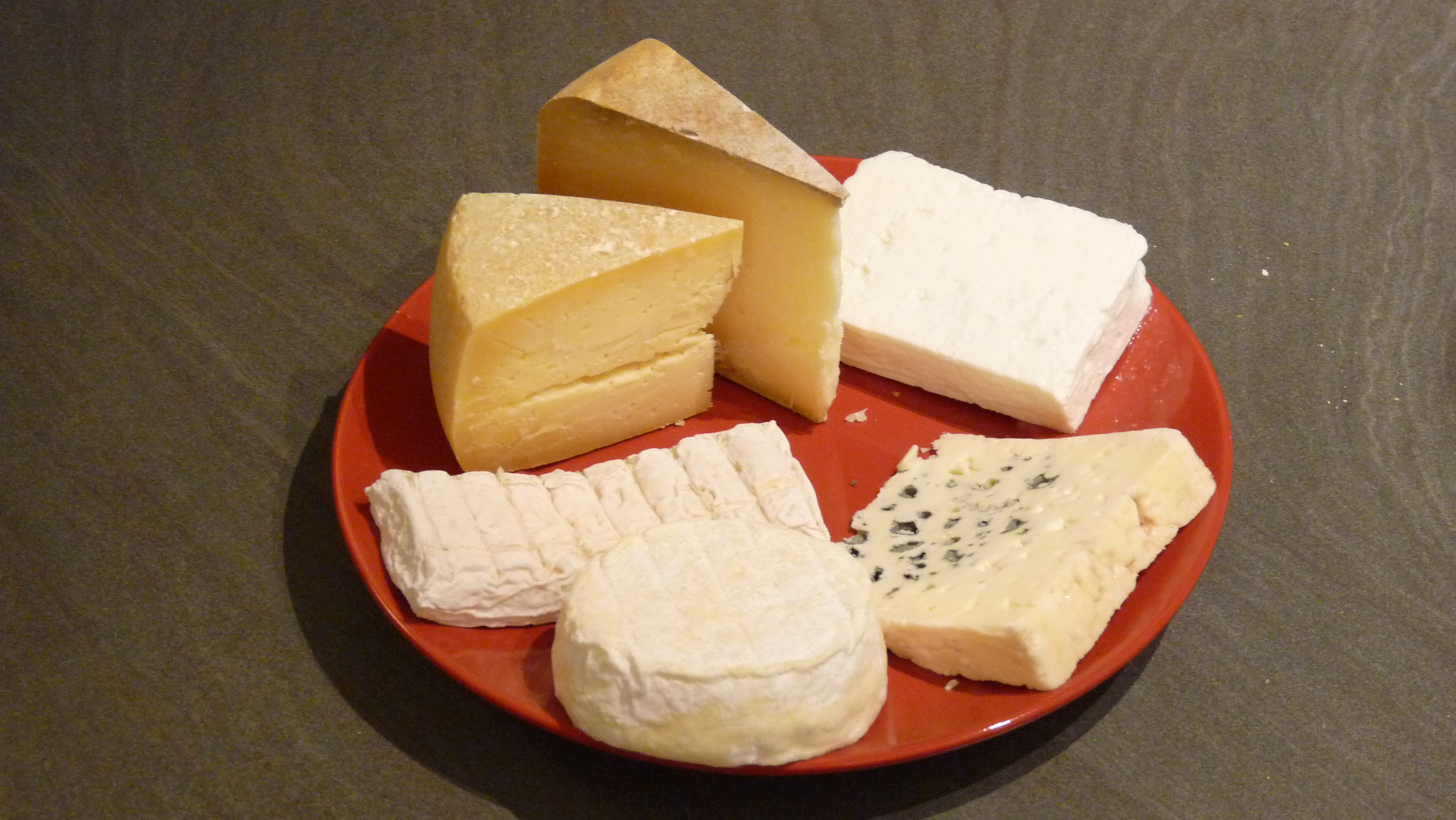 Fromaĝoj: horloĝsense: Ouso Irati (ŝafina fromaĝo el Eŭskio), Feta (ŝafina fromaĝo el Grekio), Roquefort (ŝafina fromaĝo el Francio), Paloubéen (bovina fromaĝo el Francio), Brique (kaprina fromaĝo el Francio), Tome (bovina fromaĝo el Francio)